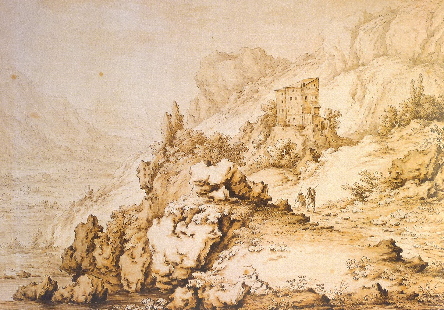 Burg Haldenstein, Aquarell von Daniel Düringer (1720-1786)